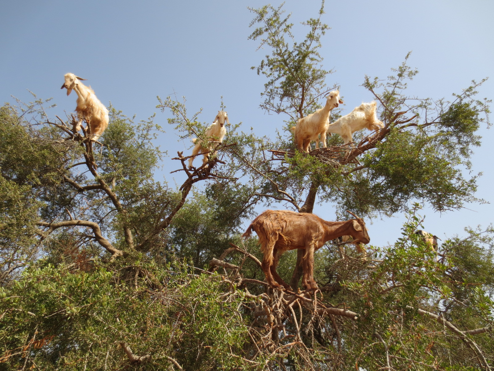 Arganier et chèvres entre Marrakech et l'Atlas au Maroc